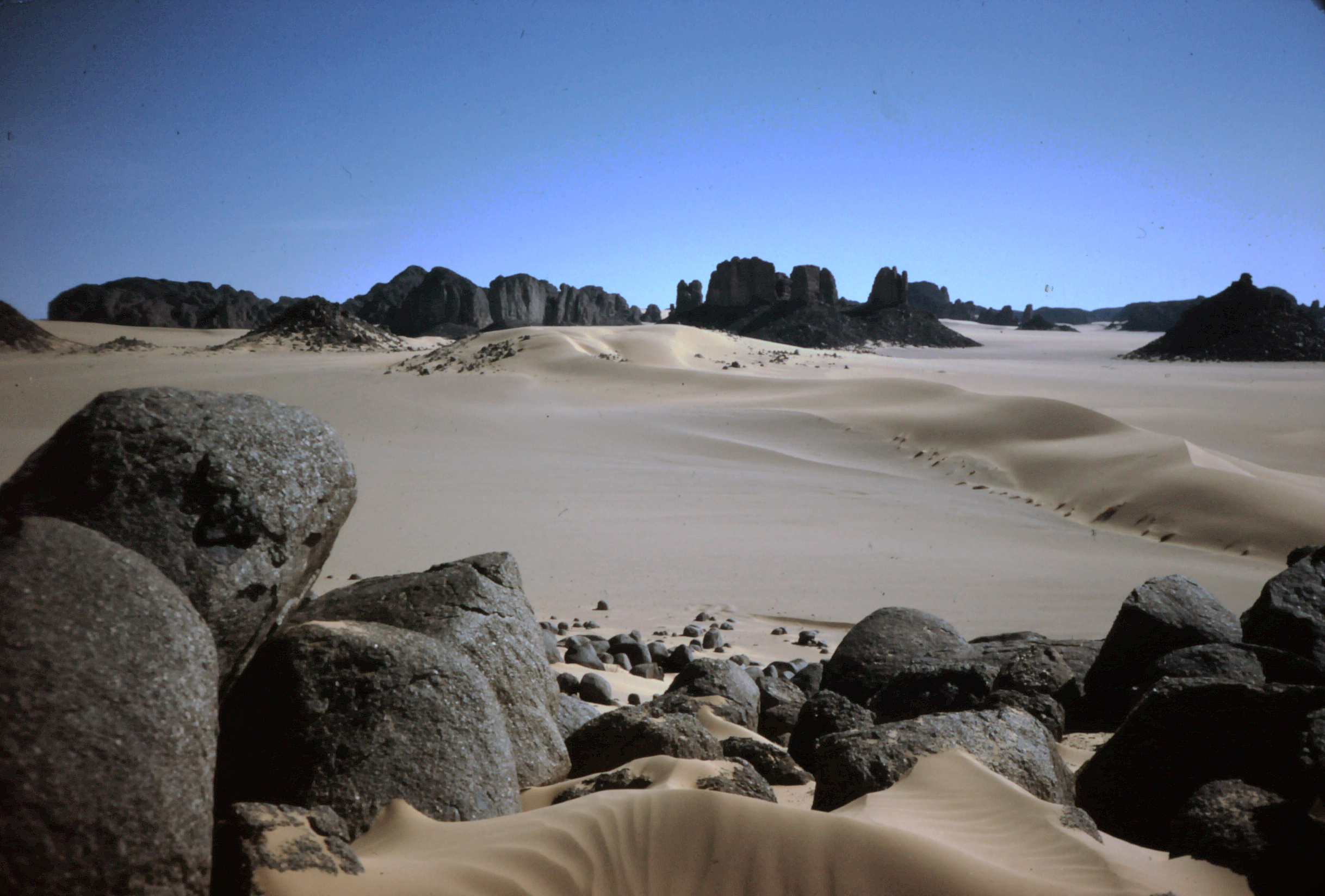 Tassili des Ajjers (grès paléozoïques fluviatiles, env. 450 millions d'années) en cours d'ensablement par les dunes du grand erg oriental, avec des vents dominants venant de l'ouest. Le sable provient de l'érosion de falaises gréseuses ou des granits du Tademaït (?), au sud d'Aïn Salah. Au premier plan: érosion en boule dans un affleurement local de granit. Sahara 1974.